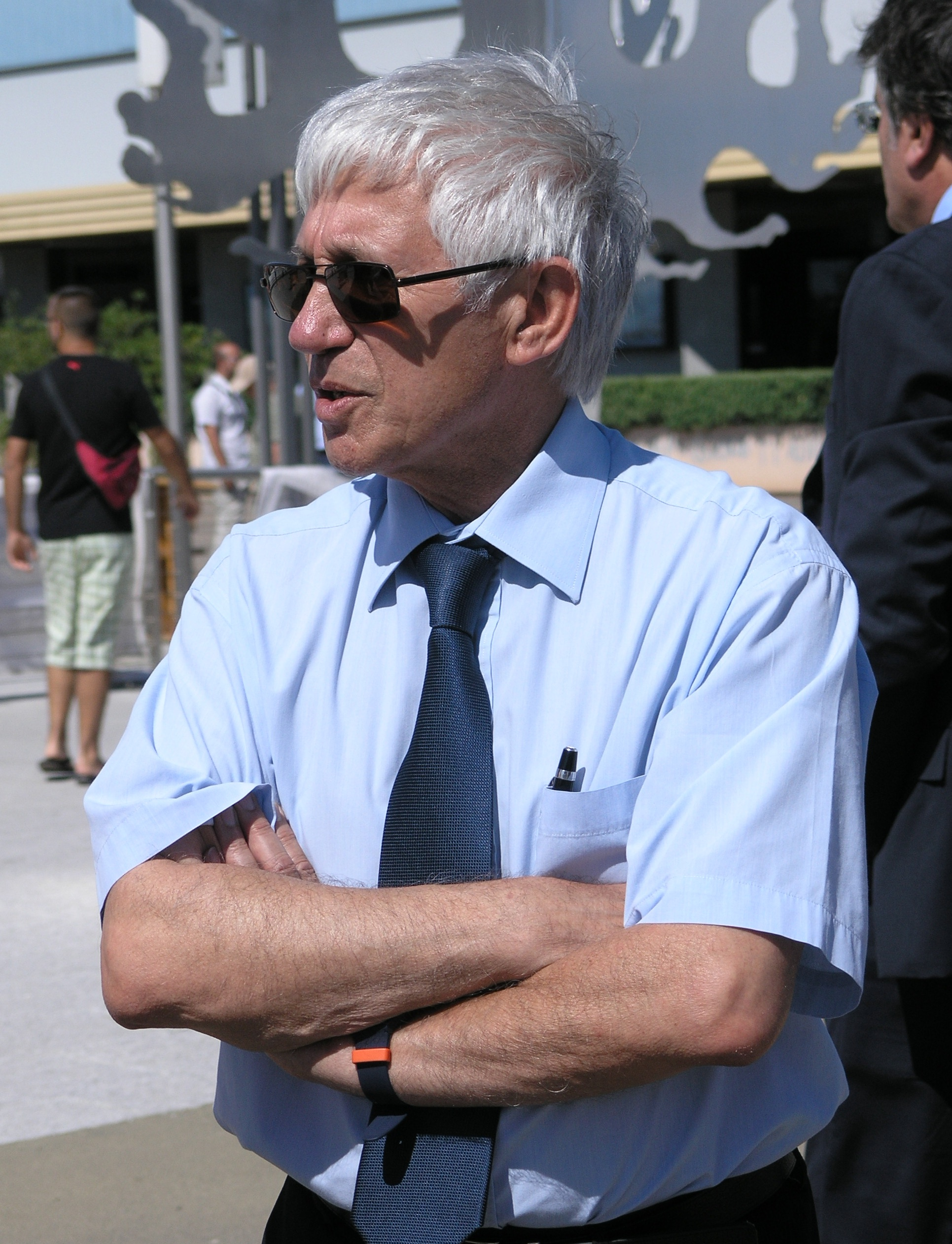 L'ing Cyril Guy Négre a Cagliari per la presentazione dell'AirPod